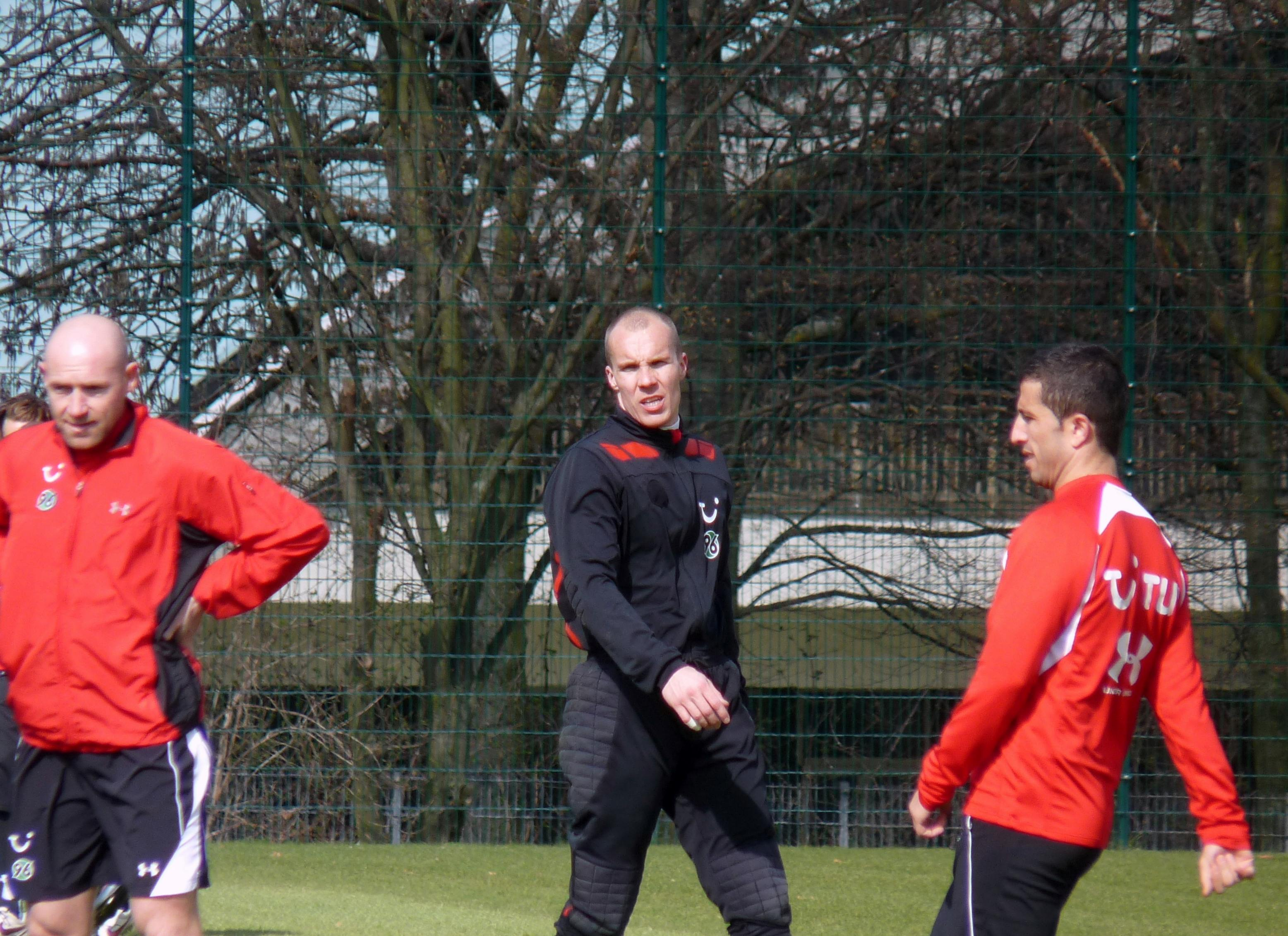 Robert Enke beim Training mit Teamkollegen (Jiri Stajner und Altin Lala) auf dem Trainingsgelände in Hannover.